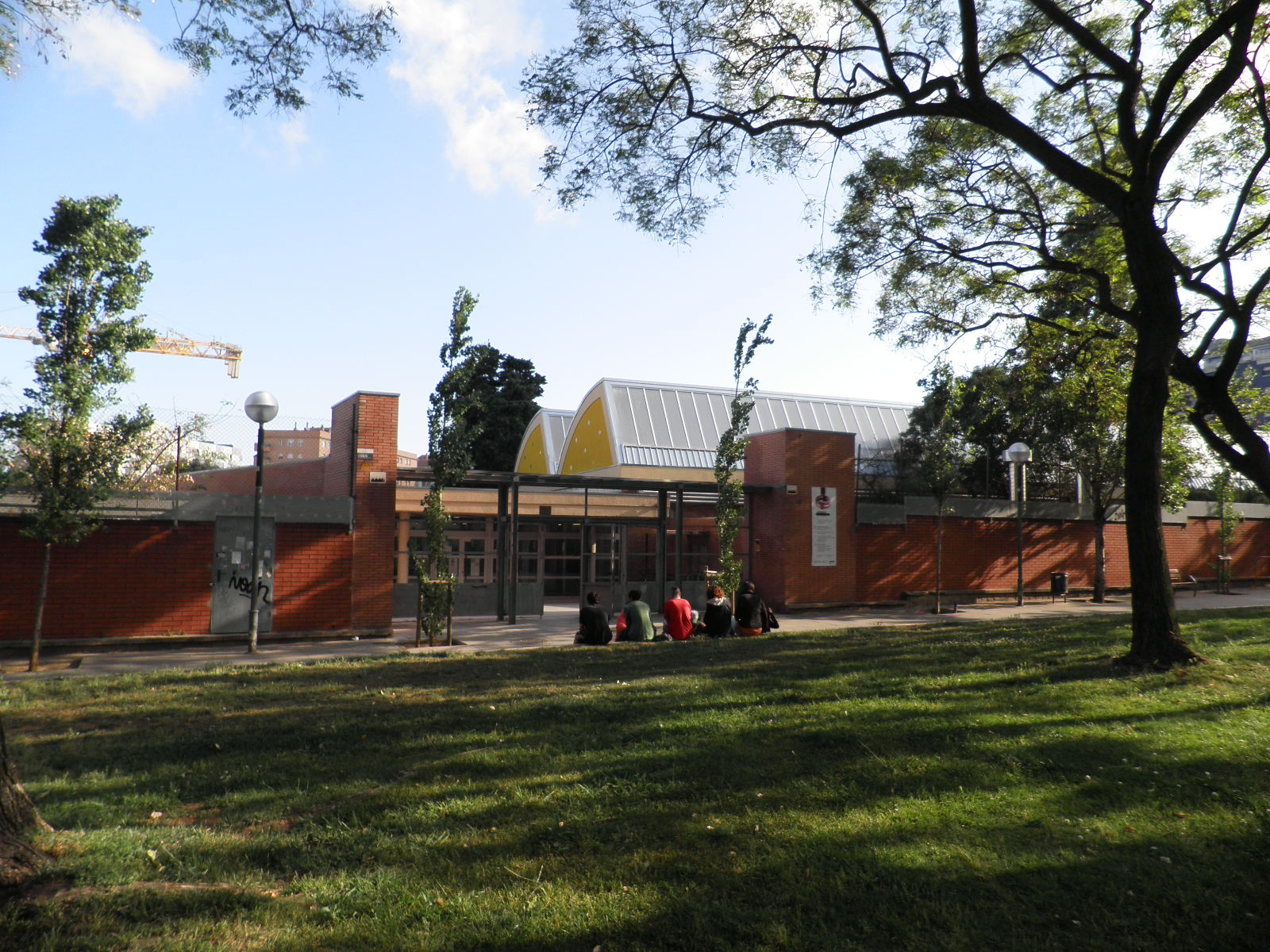 Exposició Llotja il·lustra Viquipèdia, Maig-Juny 2012. Edifici d'il·lustració de Llotja Sant Andreu (Barcelona). Sala Sabaté Pi. OLYMPUS DIGITAL CAMERA